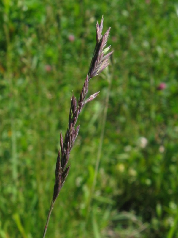 Rot-Schwingel Festuca rubra agg., Stoltera Nähe Rostock